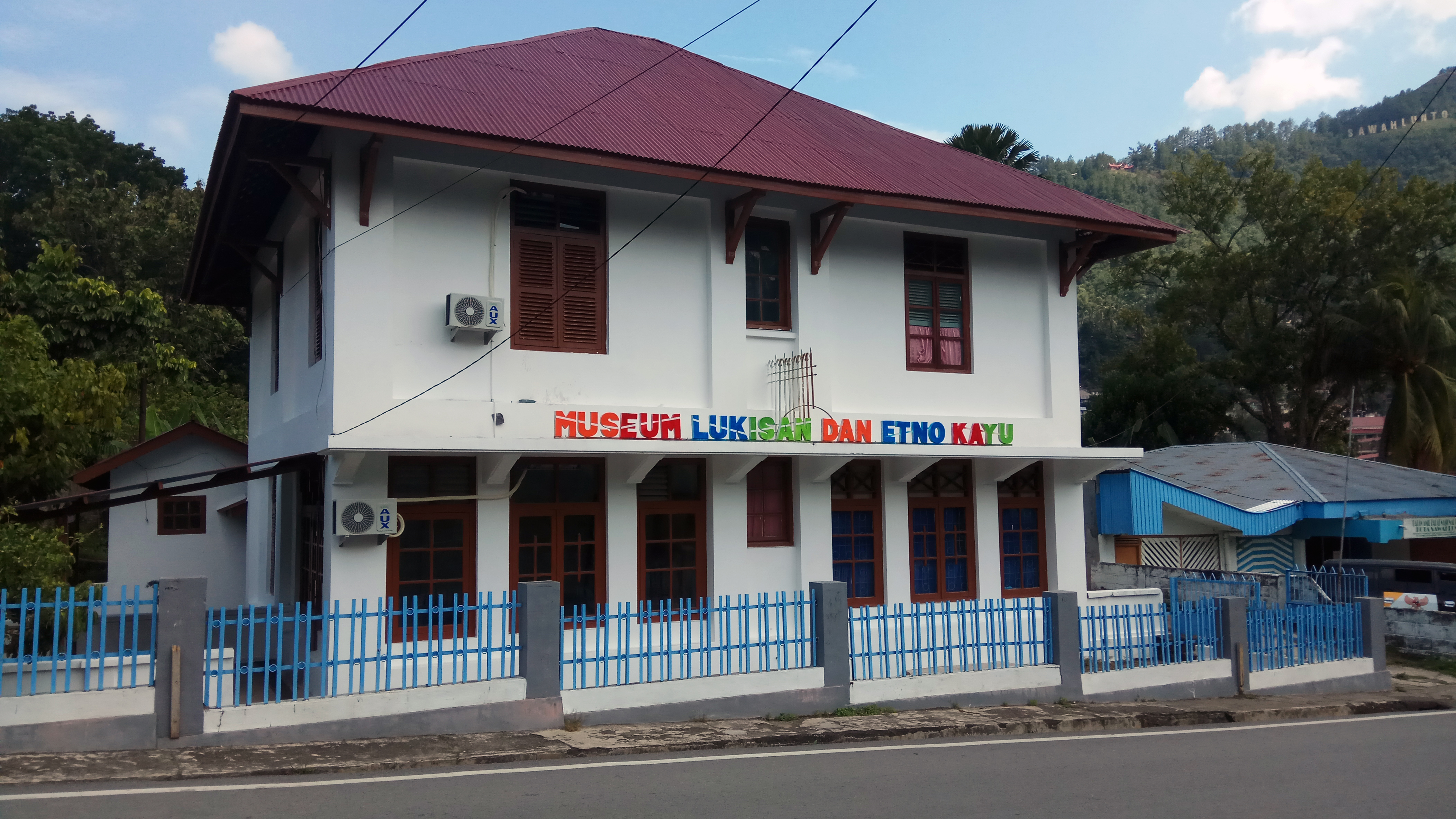 Museum Lukisan dan Etno Kayu di Kelurahan Saringan, Kecamatan Barangin, Kota Sawahlunto, Sumatera Barat.